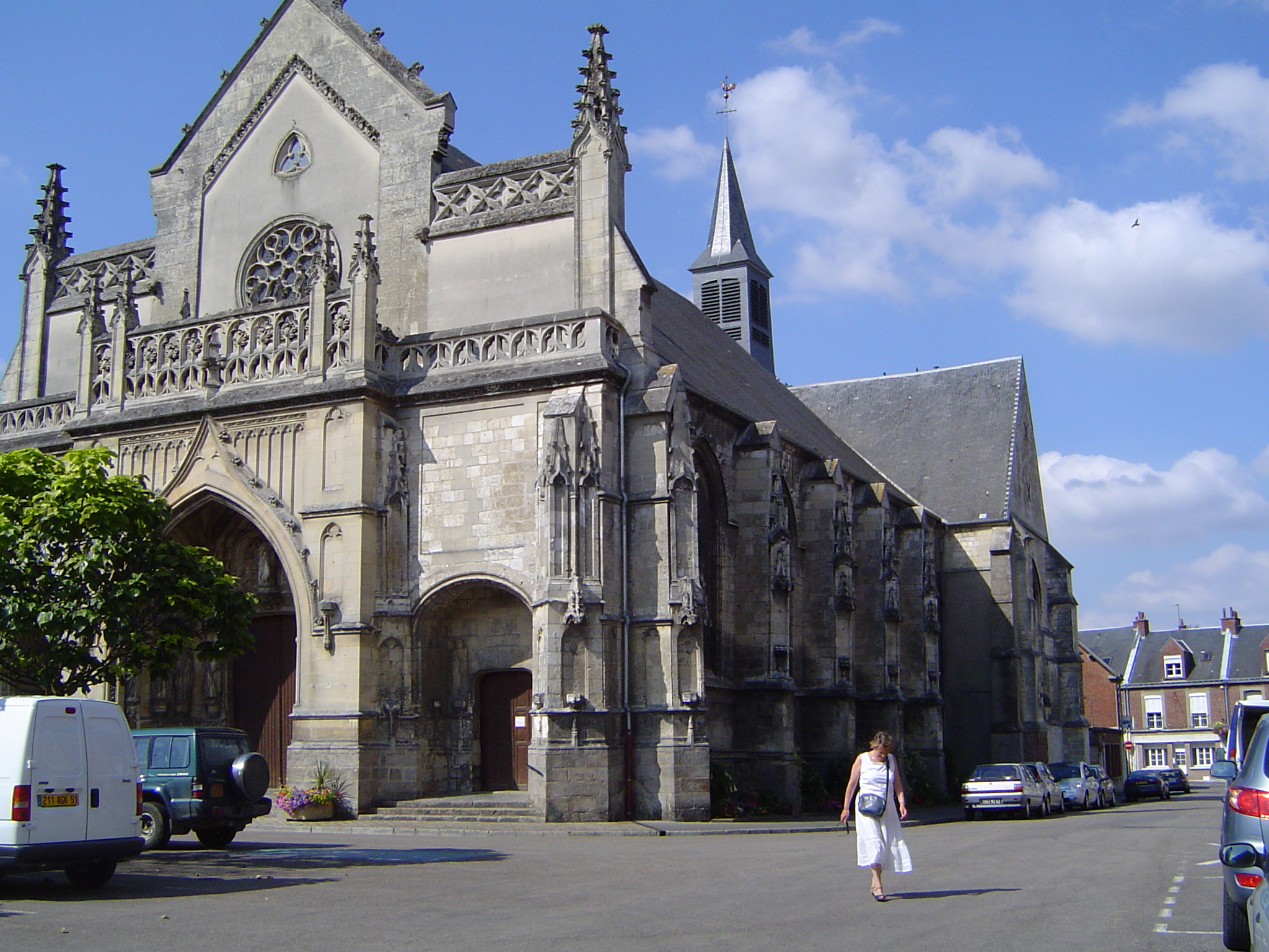 Photos prises dans la commune de Doullens (Somme)